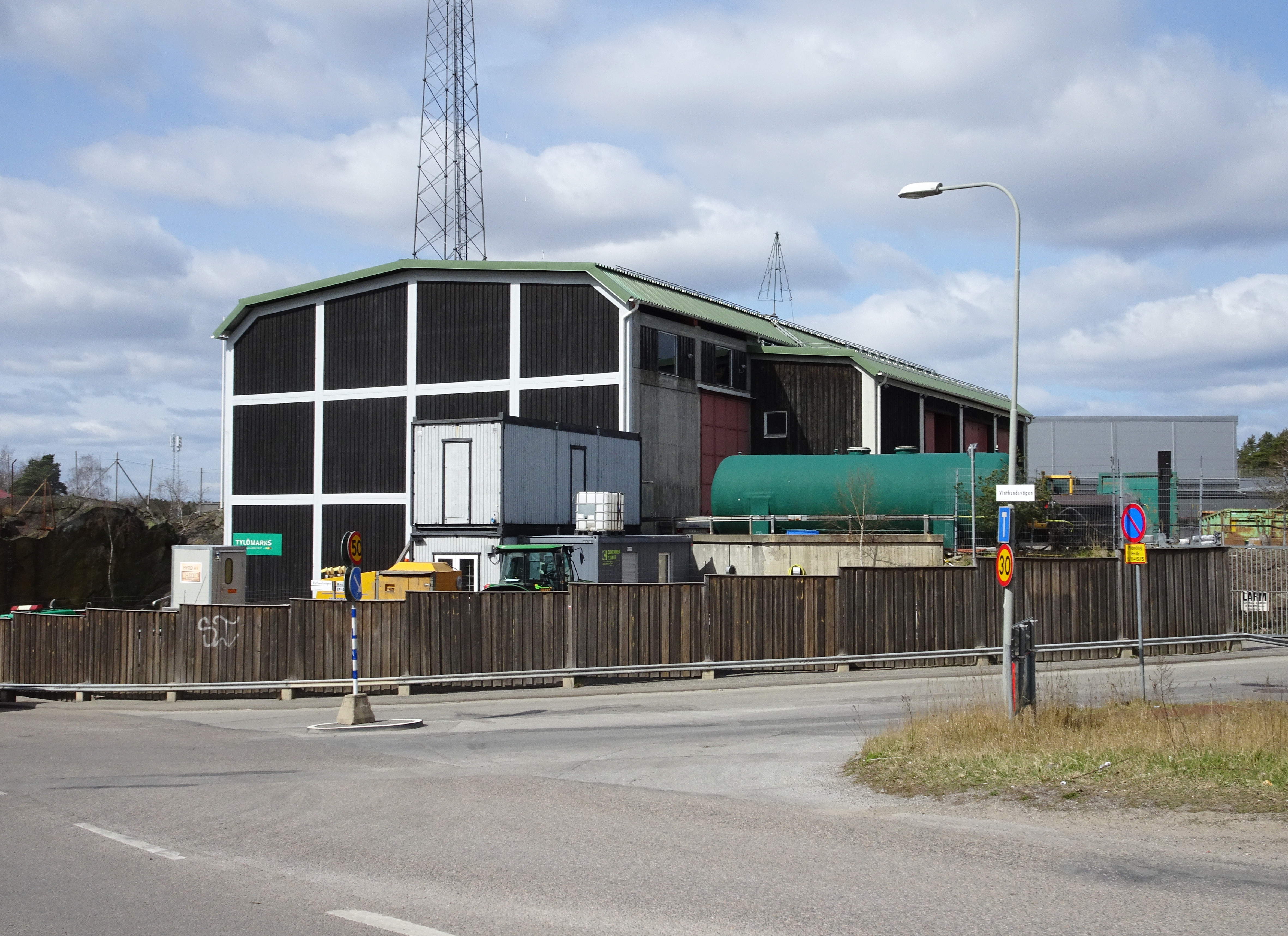 Byggnadsfirma AB ER - NO (Byggmästare), Gunnar Lené (Arkitekt), Stockholms stads gatukontor, byggnadsavdelningen (Byggherre), byggår 1959